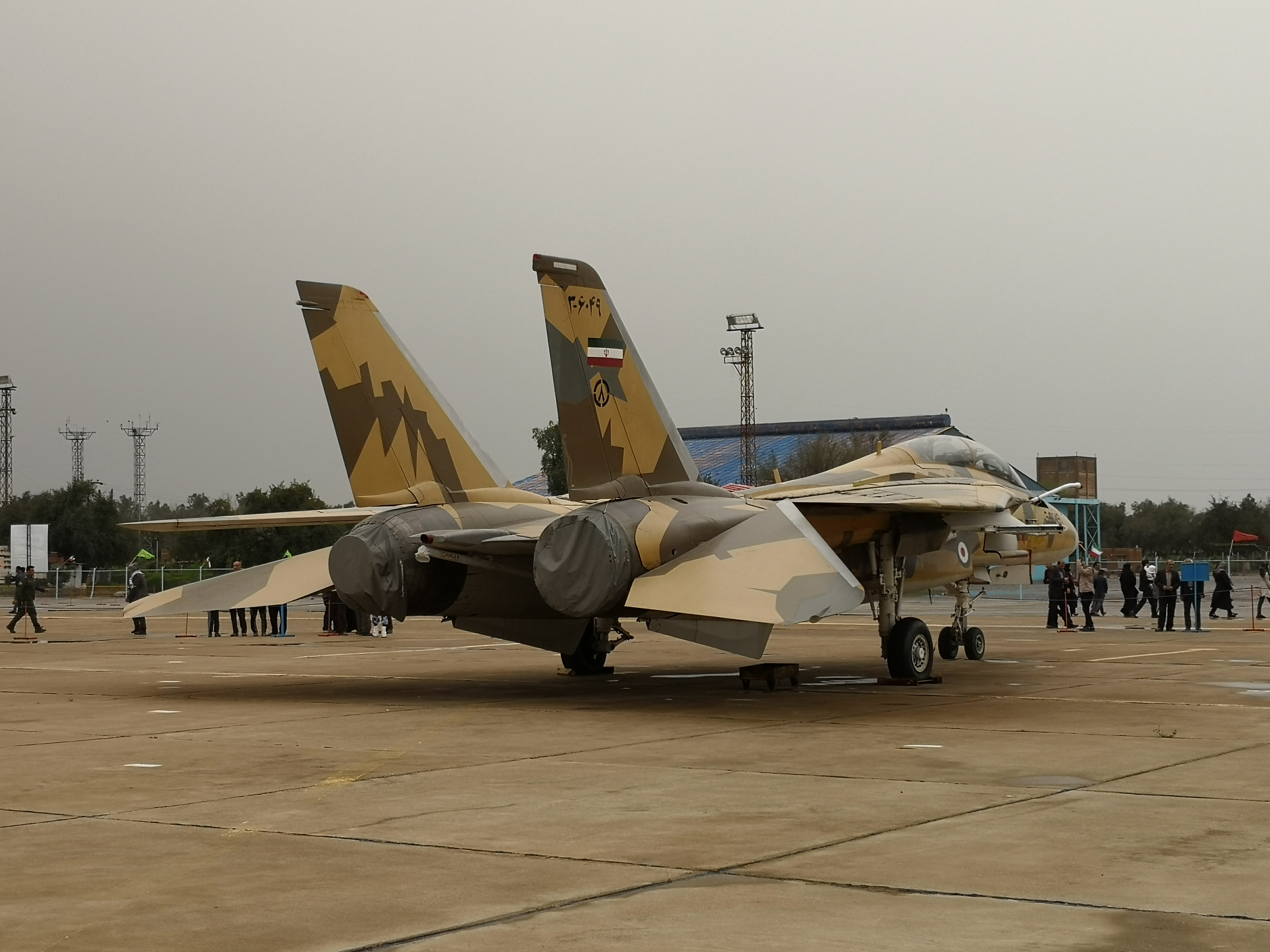 جنگنده ی تامکت اف 14 مدل آ در نمایشگاه نوروزی پایگاه چهارم شکاری دزفول